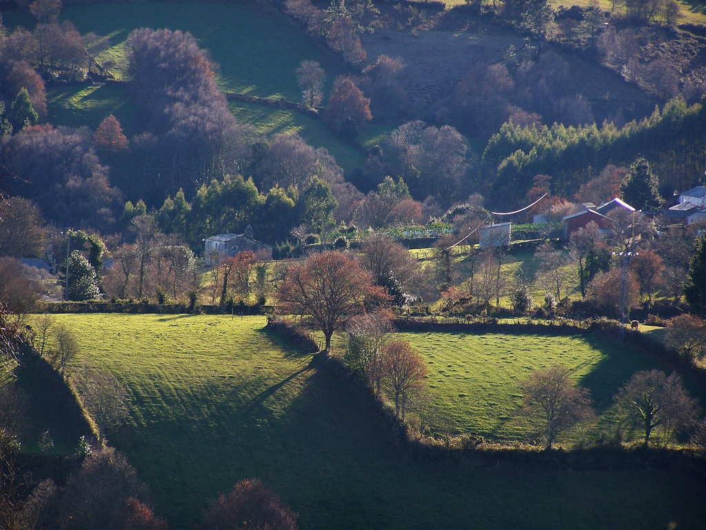 Labrada, Abadín, Galiza